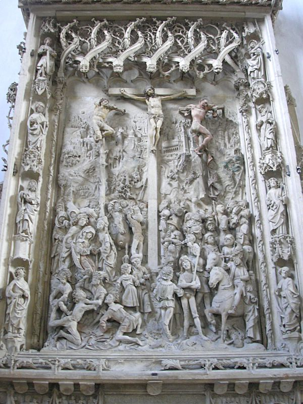 Dom zu Eichstätt (Oberbayern). "Pappenheimer Altar". Mittelteil. Eigene Aufnahme, April 2007 / Eichstaett cathedral (Upper Bavaria, Germany). The "Pappenheimer Altar". Central part. Own photo, April 2007